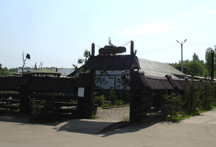 Ресторан в д.Красновидово Можайского района Московской области